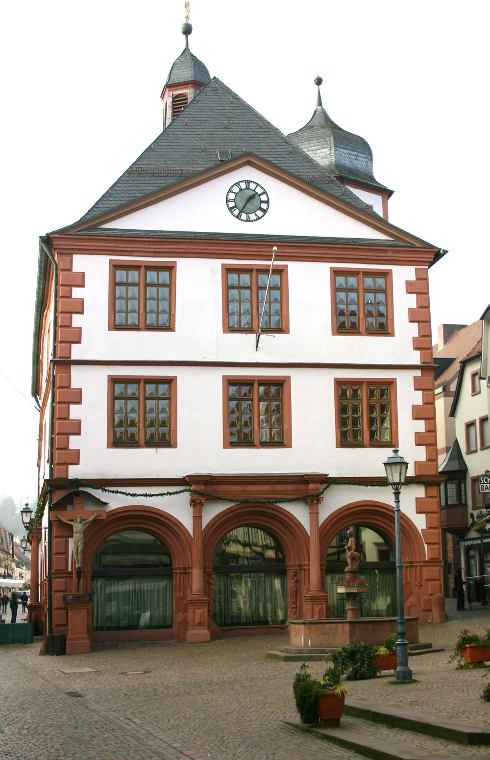 Beschreibung: Lohr am Main - Altes Rathaus Ursprung: Selbst fotografiert von Sven Teschke am 15. Januar 2005 Lizenzstatus: GNU FDL